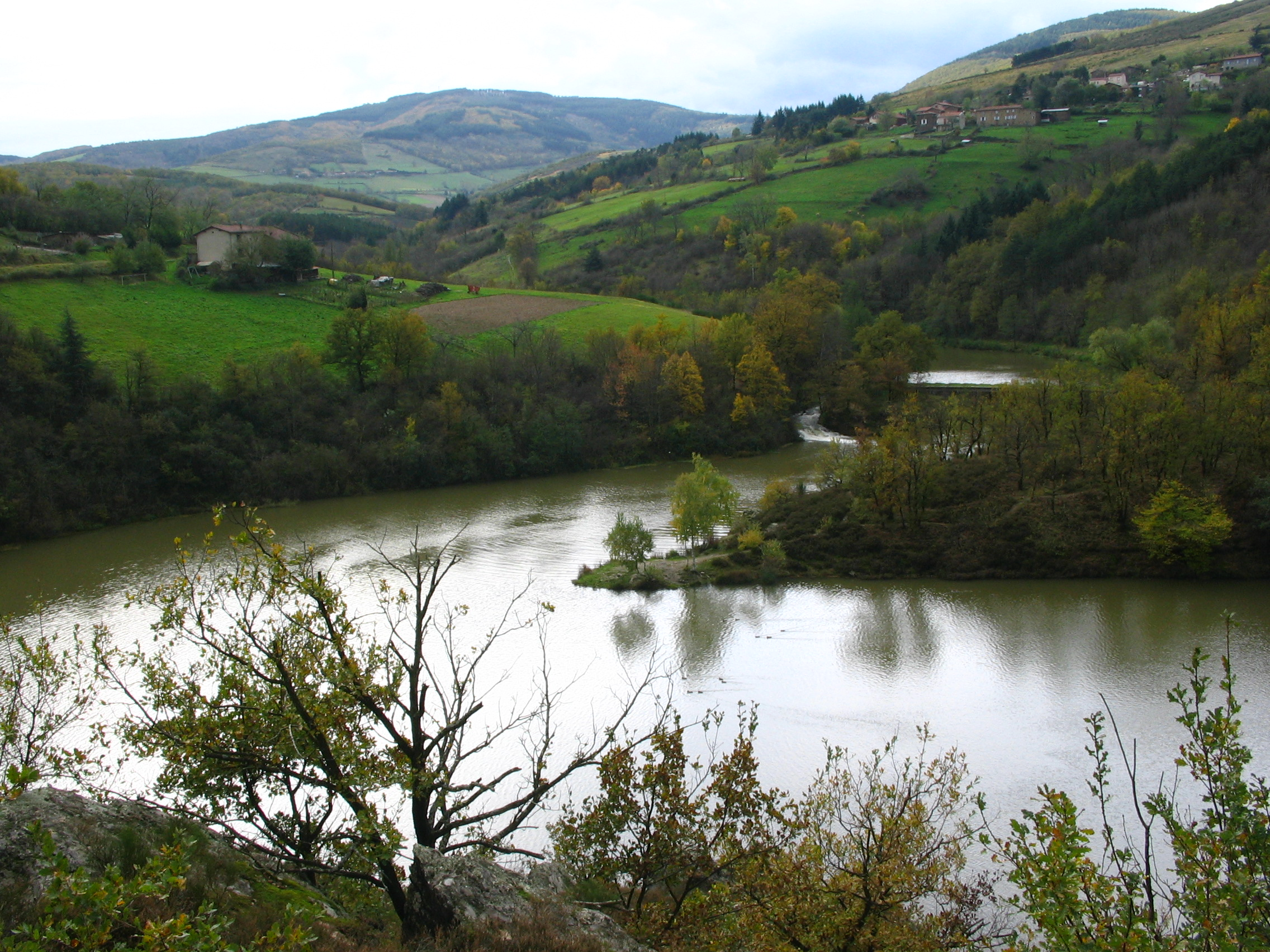 Vallée du Couzon depuis D30, entre Rive et Ste-Croix (Loire), en amont du barrage.